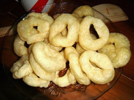 makanan